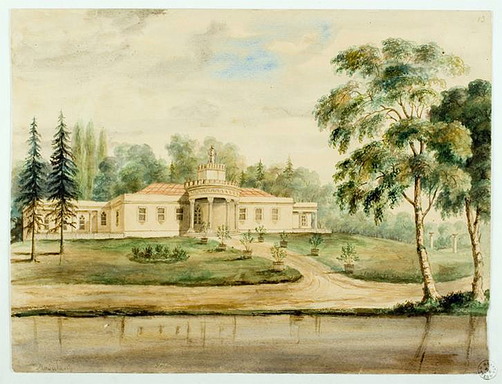 Беларуская (тарашкевіца): Масаляны (Masalany), сядзіба Бісьпінгаў (Bisping)